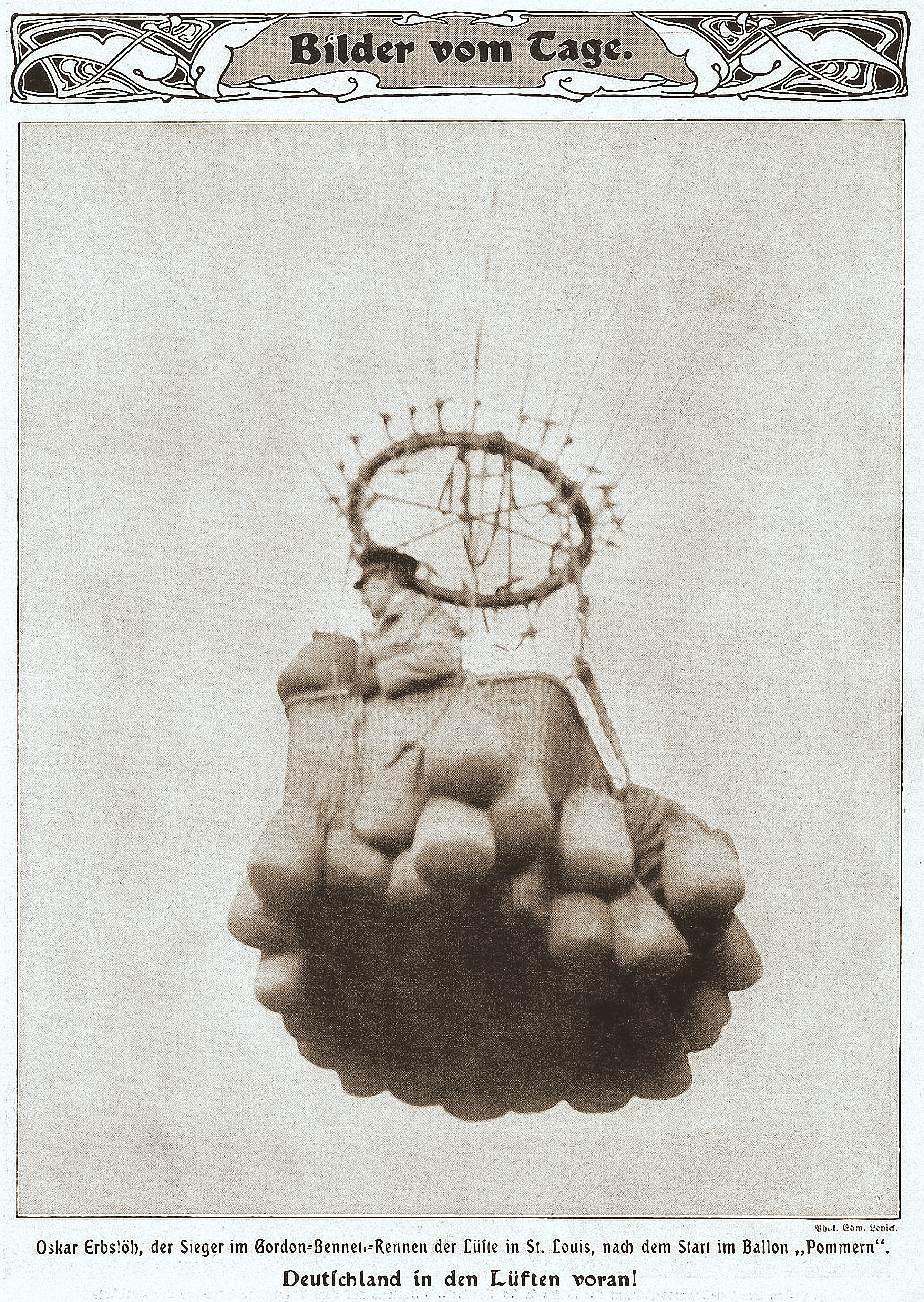 Eine Seite aus der illustrierten Zeitschrift „Die Woche“ , Nr. 45 vom 9. November 1907, August Scherl-Verlag, Berlin 1907, S. 1969, hier mit dem Rasterdruck einer Aufnahme des Fotografen Edwin Levick, untertitelt: „Oskar Erbslöh, Sieger im Gordon-Bennet-Rennen der Lüfte in St. Louis, nach dem Start im Ballon "Pommern".“ „Deutschland in den Lüften voran!“ ...